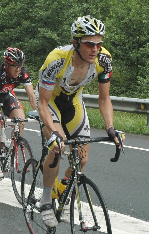 Jörg Jaksche Euskal Bizikleta 2007